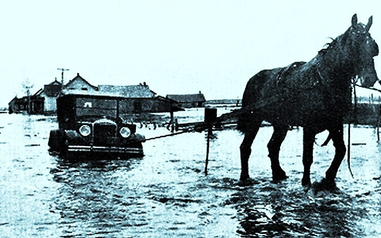 Innondation à Roberval, 1928